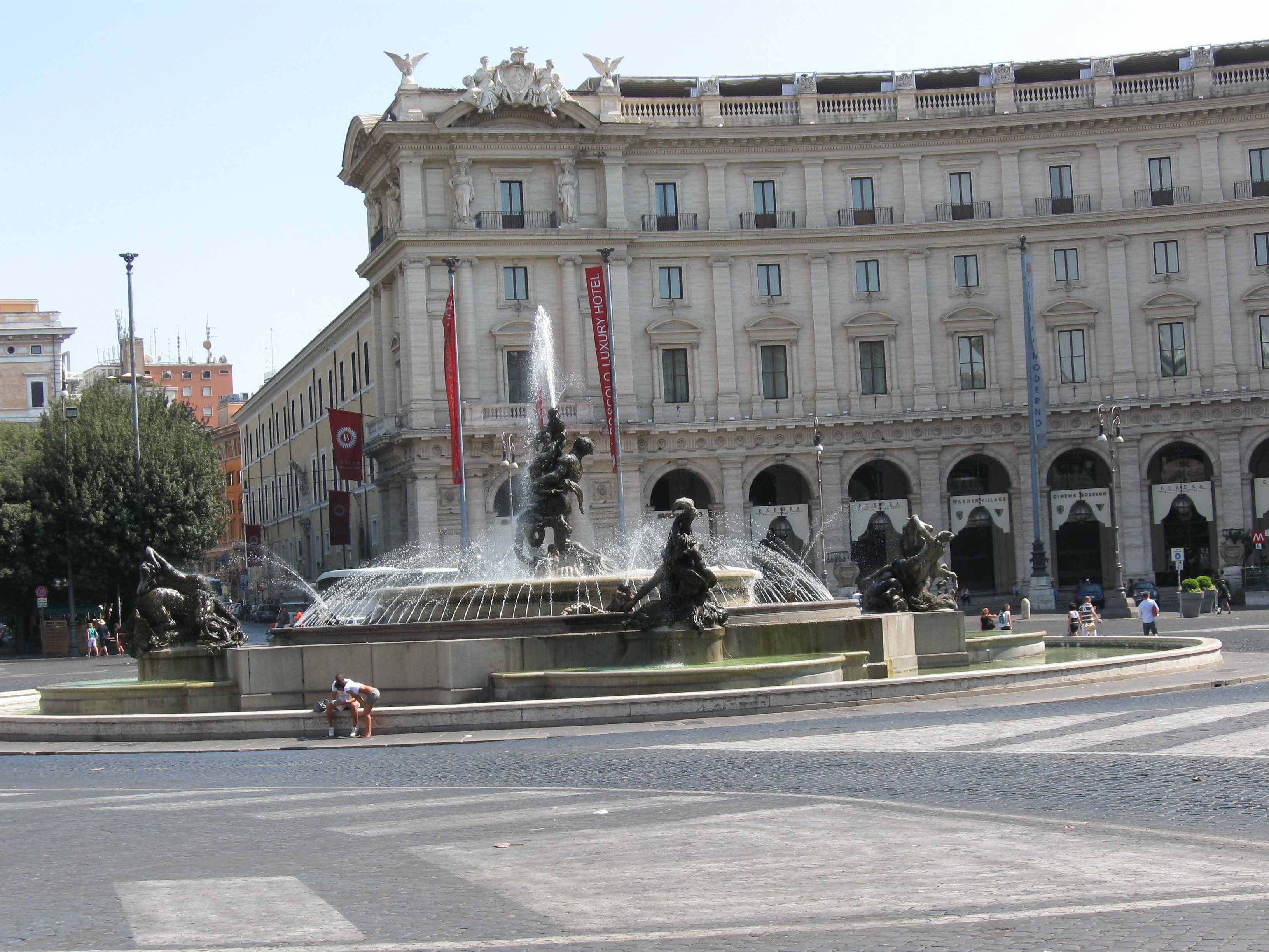 La Fontaine des Naîades à Rome